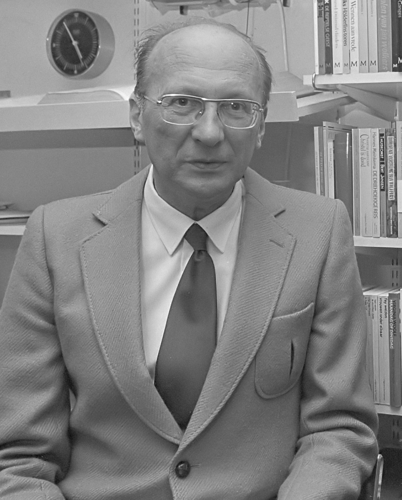 De dichter Hans Warren (links) en zijn uitgever Bert Bakker (jr.) 25 september 1981